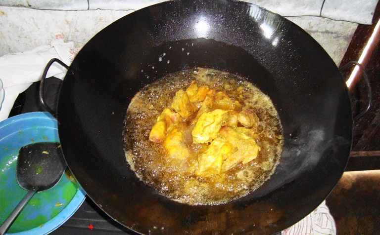 Daging ayam yang telah dibumbui sedang digoreng.